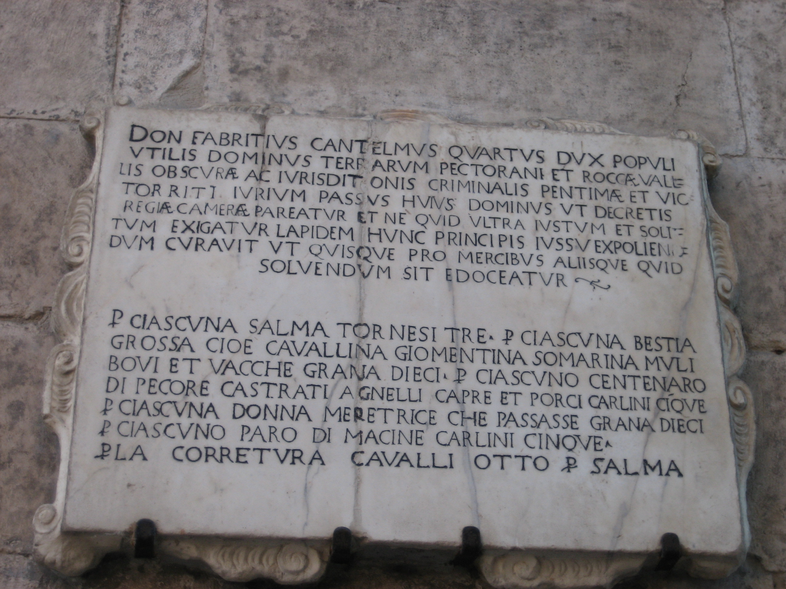 Popoli Summary Autore: My own production, free use Descrizione: Lapide posta sulla facciata esterna della taverna del XIV secolo a Popoli, in provincia di Pescara, in Abruzzo (Italia). Nella stessa vengono riportati i compensi da corrispondere al momento del transito presso la stessa dogana: da notare che se la prima parte è scritta in latino, la seconda, per essere più facilmente compresa dal popolo, è scritta in italiano volgare.